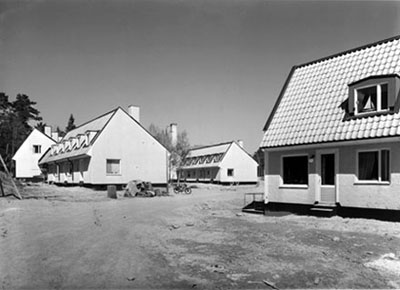 Skönstaholm, Hökarängen, Söndagsvägen 76 och 77